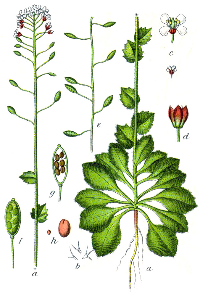 Draba muralis L., syn. Crucifera capselloides E.H.L.Krause Original Caption Mauer-Hungerblümchen, Crucifera capselloides